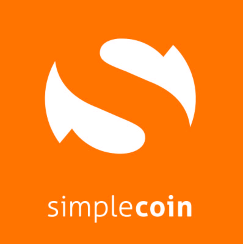 Logo simplecoin.eu